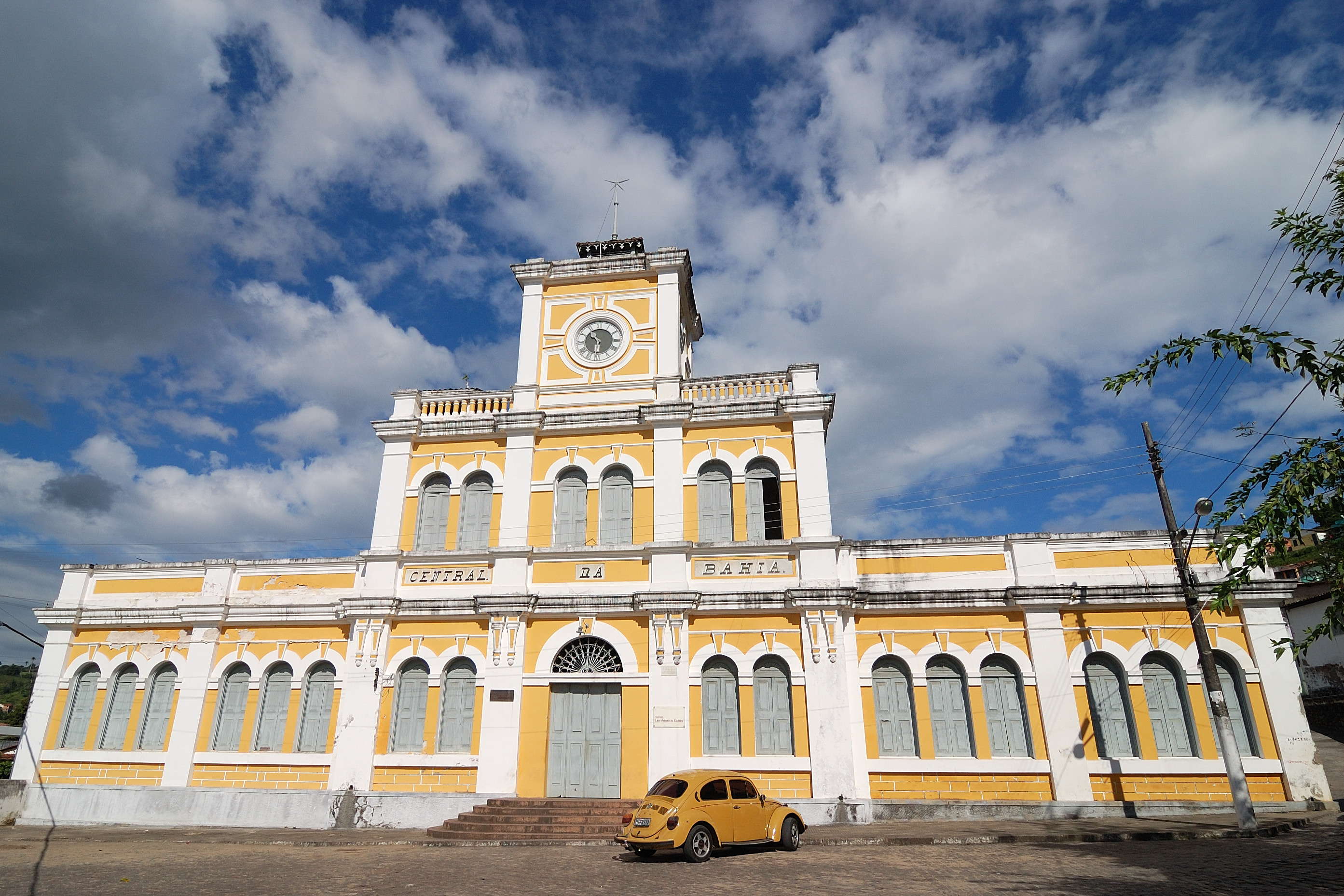 EFCBH em São Félix, Brasil [2011]